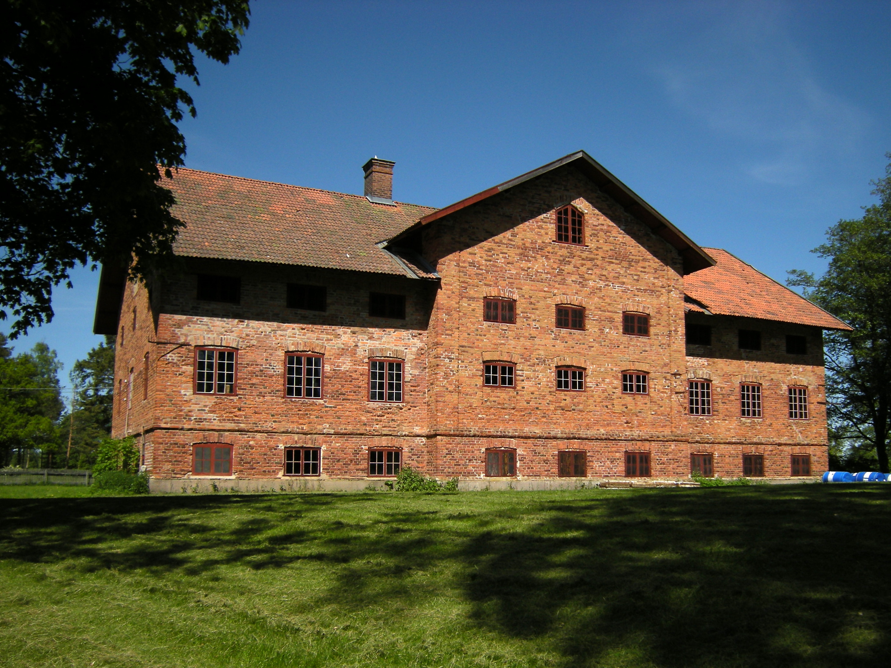 Gammalstilla bruk, tegelmagasinet. Bergslagssafari 2010.